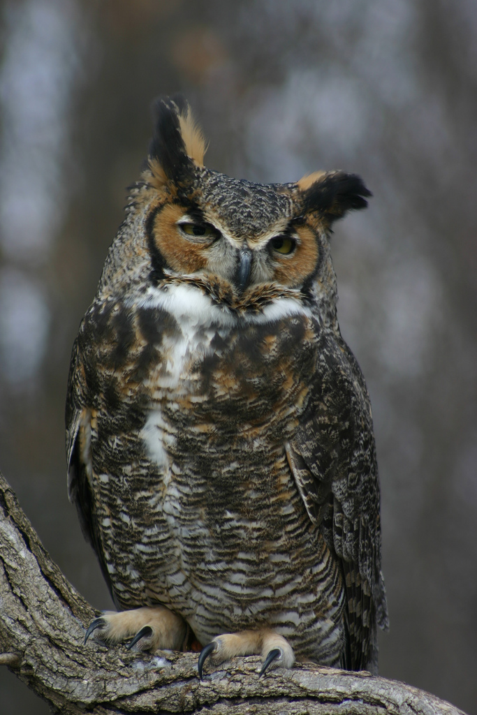 Bubo virginianus (Grand-duc D'Amérique).